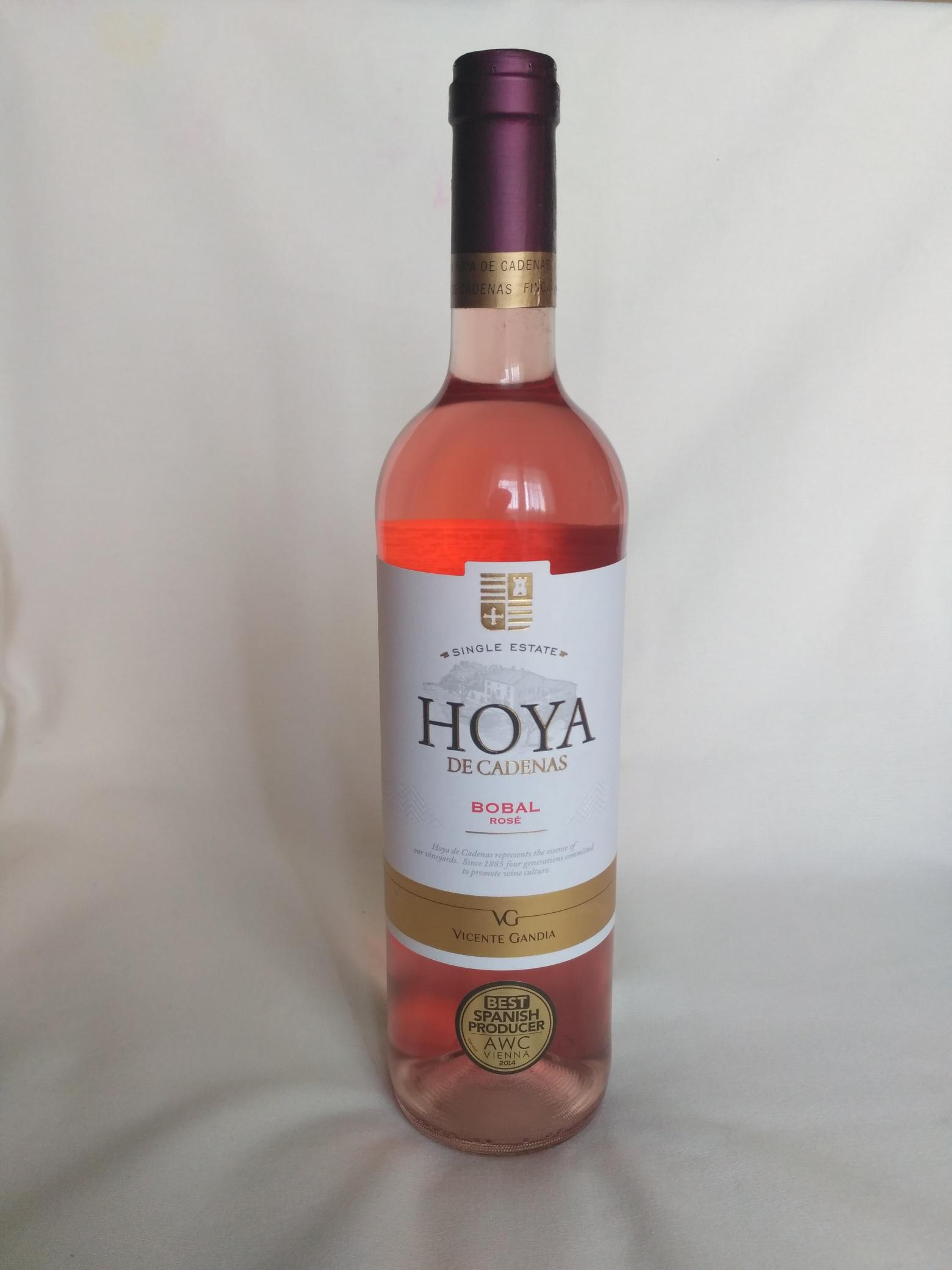 Bobal vino rose